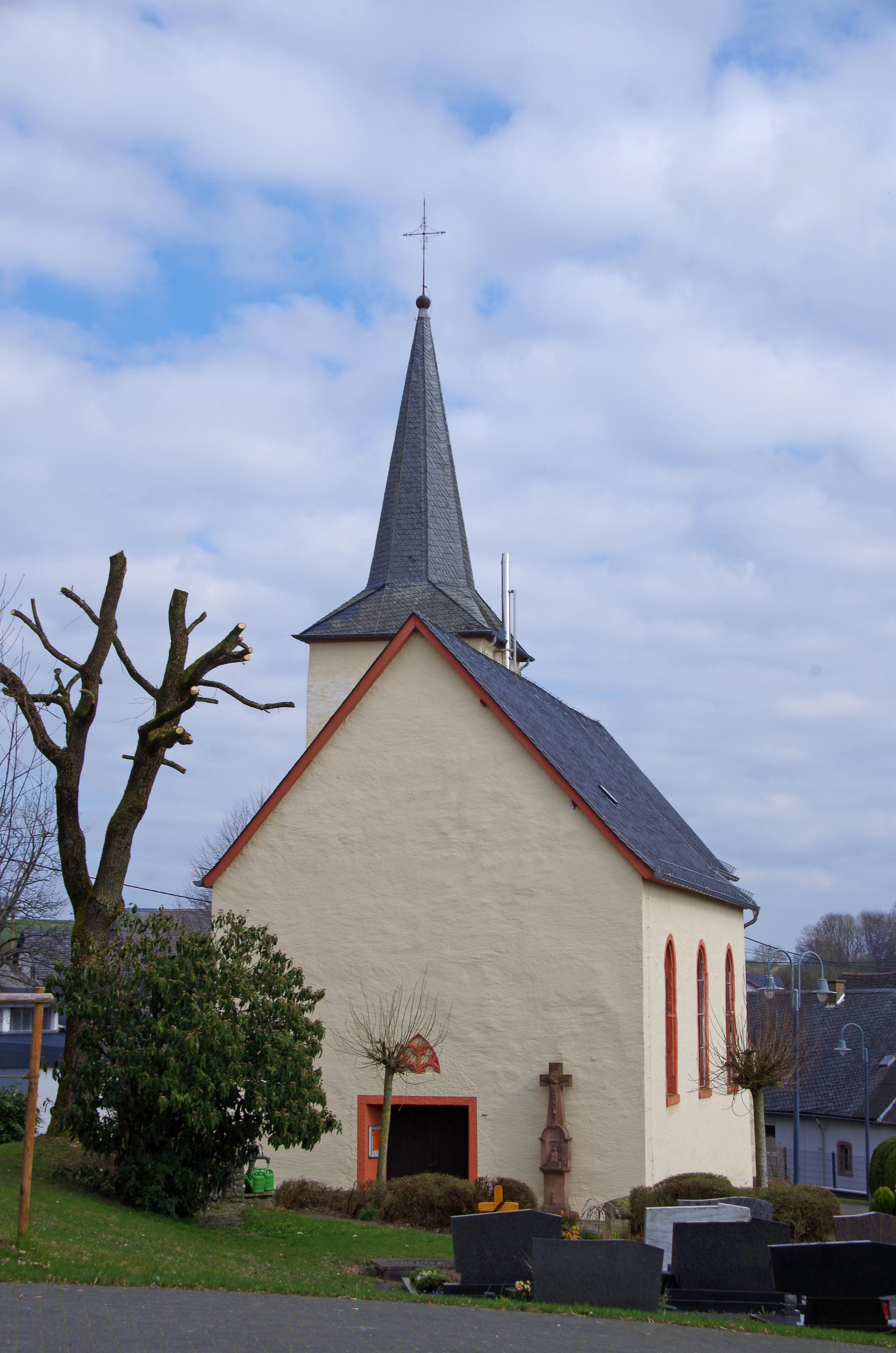 St. Lukas (Fleringen), Westfassade mit Portal